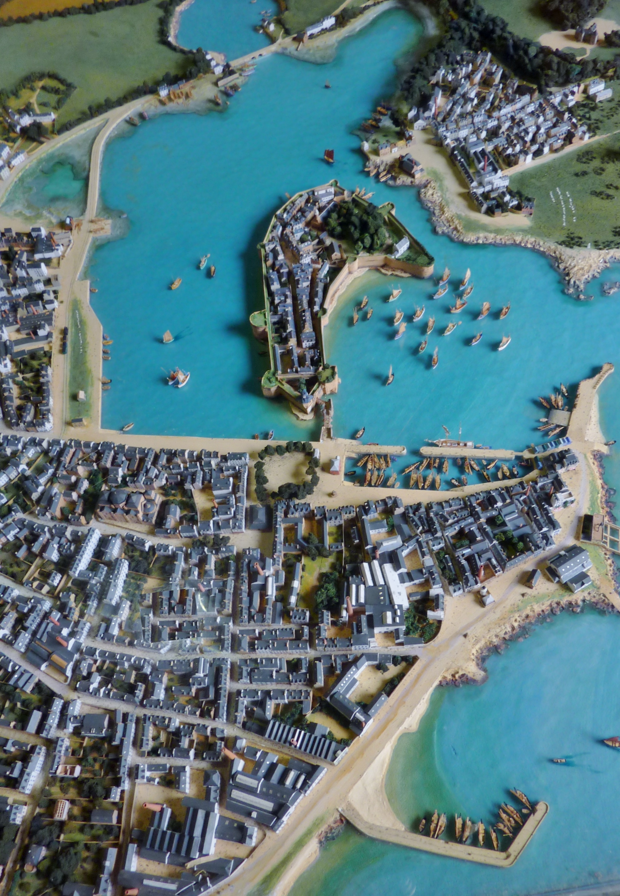 Photo de la maquette du port de Concarneau réalisée en 1912 par Le Meter, modeleur à Nantes et Charles Viaud, décorateur. Maquette exposée dans le pavillon d'accueil situé à l'entrée de la "Ville close" de Concarneau.